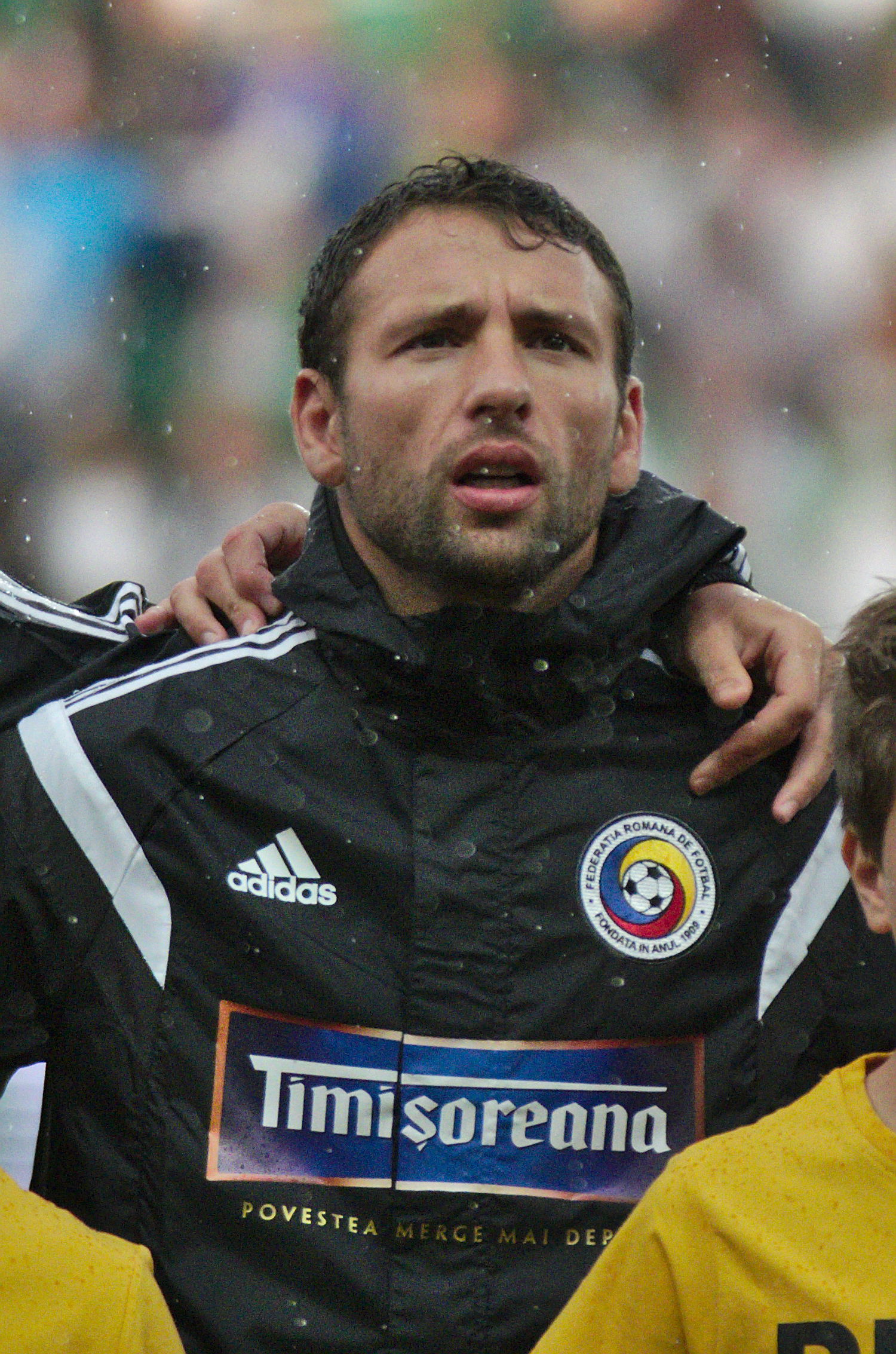 Algérie-Roumanie - 20140604 - Răzvan Raț